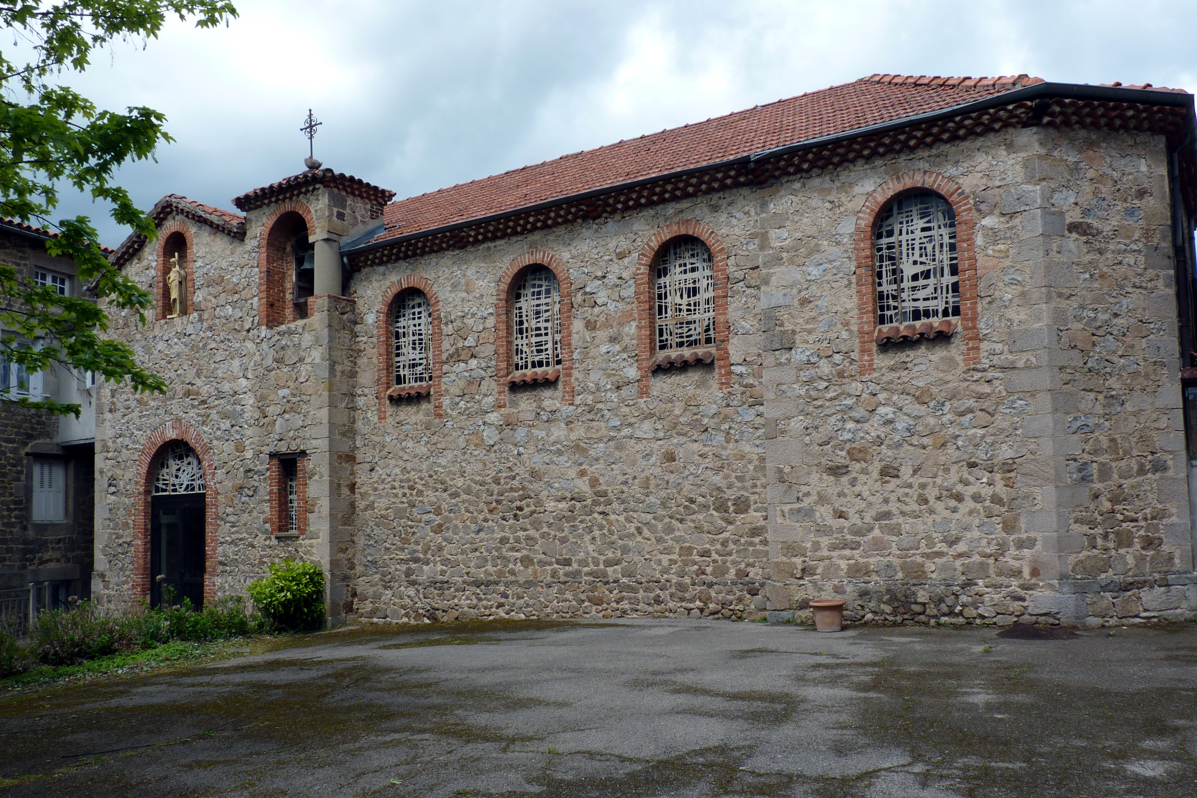 Les vitraux de Louis-René Petit ont été ajoutés en 1964 à la Chapelle Claire-Joie de Saint Didier-en-Velay